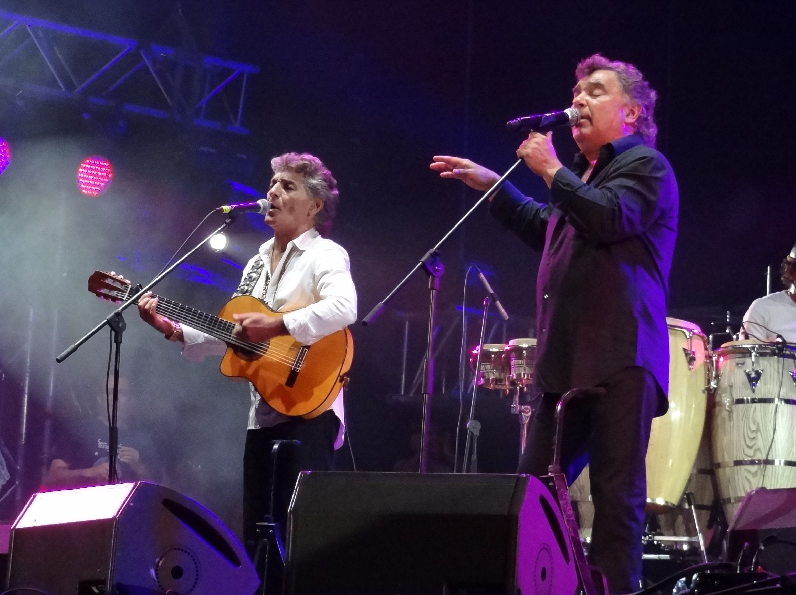 Gipsy Kings. Концерт Gipsy Kings в рамках XI Международного инвестиционного форума. Сочи, 2012.